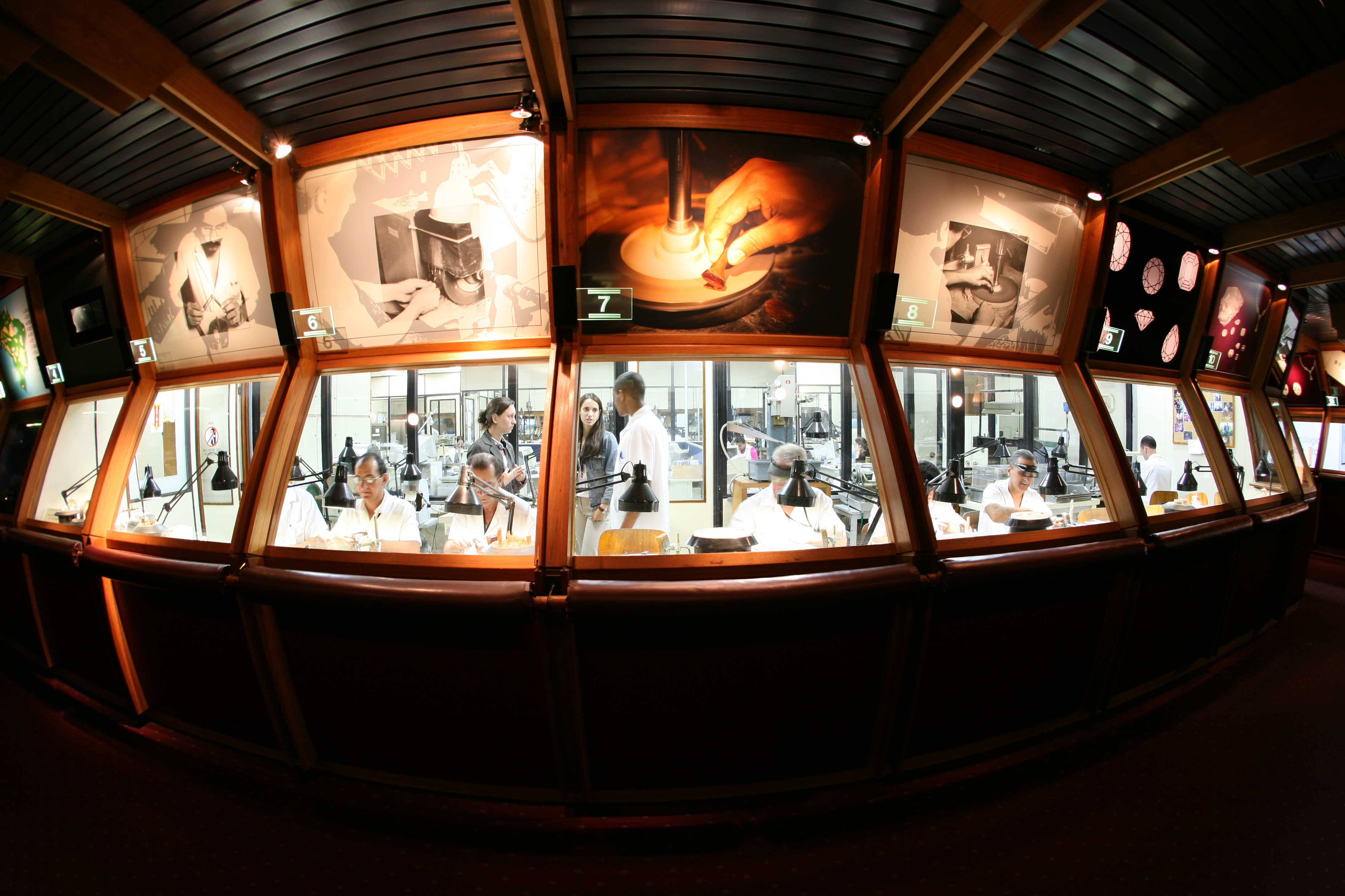 מבט על מעבדת התכשיטים במוזיאון ה.שטרן, ריו דה ז'ניירו